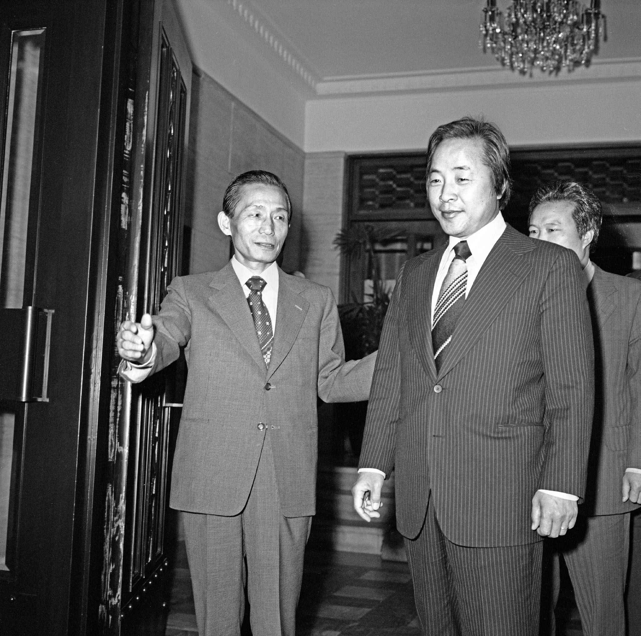 촬영일 : 1975년 05월 21일 촬영장소 : 대한민국 참석자 : 박정희 대통령, 김영삼 인물상세정보 : 박정희 대통령(좌) , 김영삼(우) 관련내용 : 박정희 대통령 김영삼 신민당 총재 접견